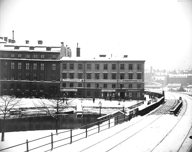 Kvarteret Memnon och Sammanbindningsbanan